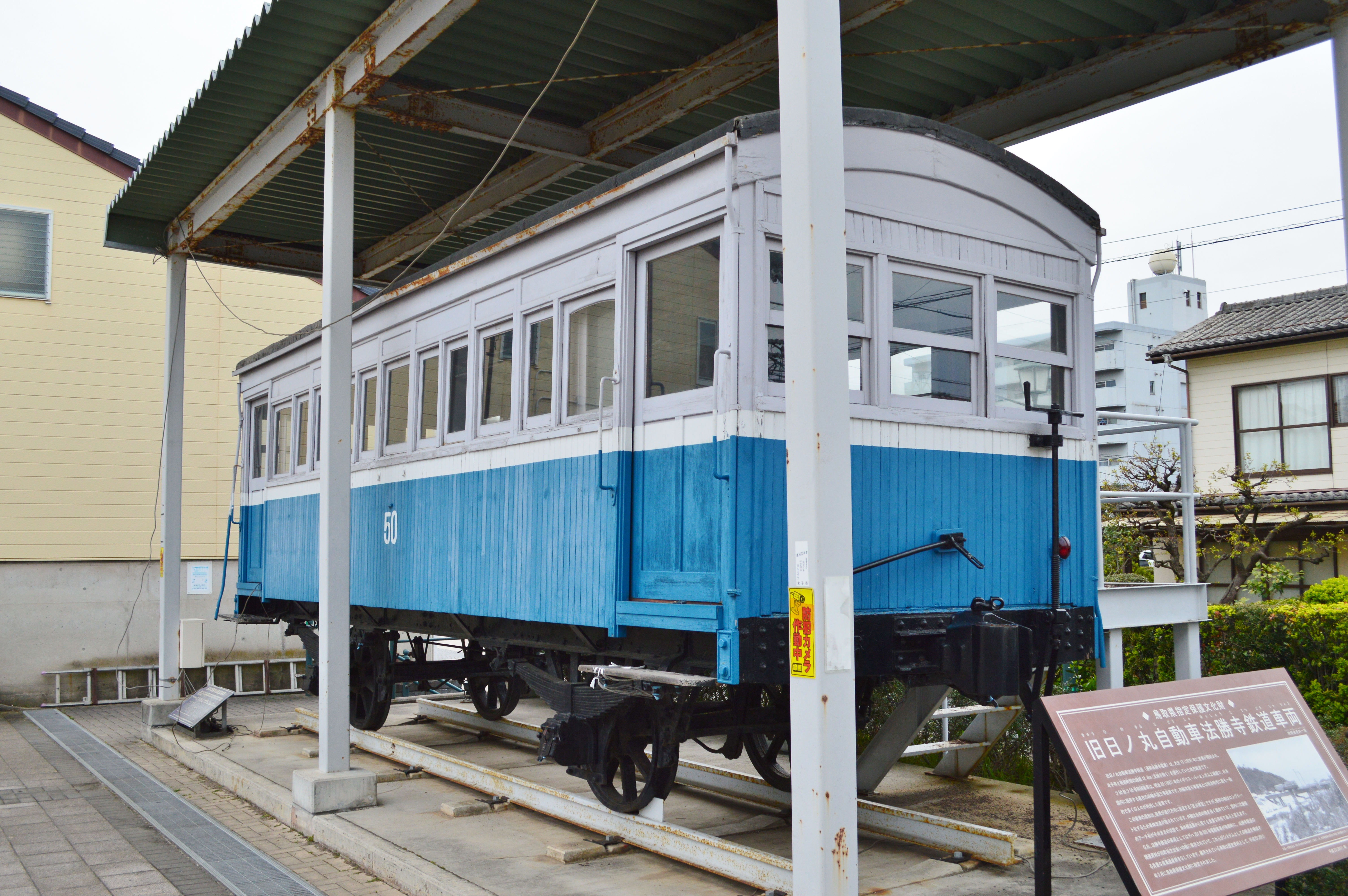 旧日の丸自動車法勝寺鉄道車両 フ50 (米子市内にて) Nikon D3200